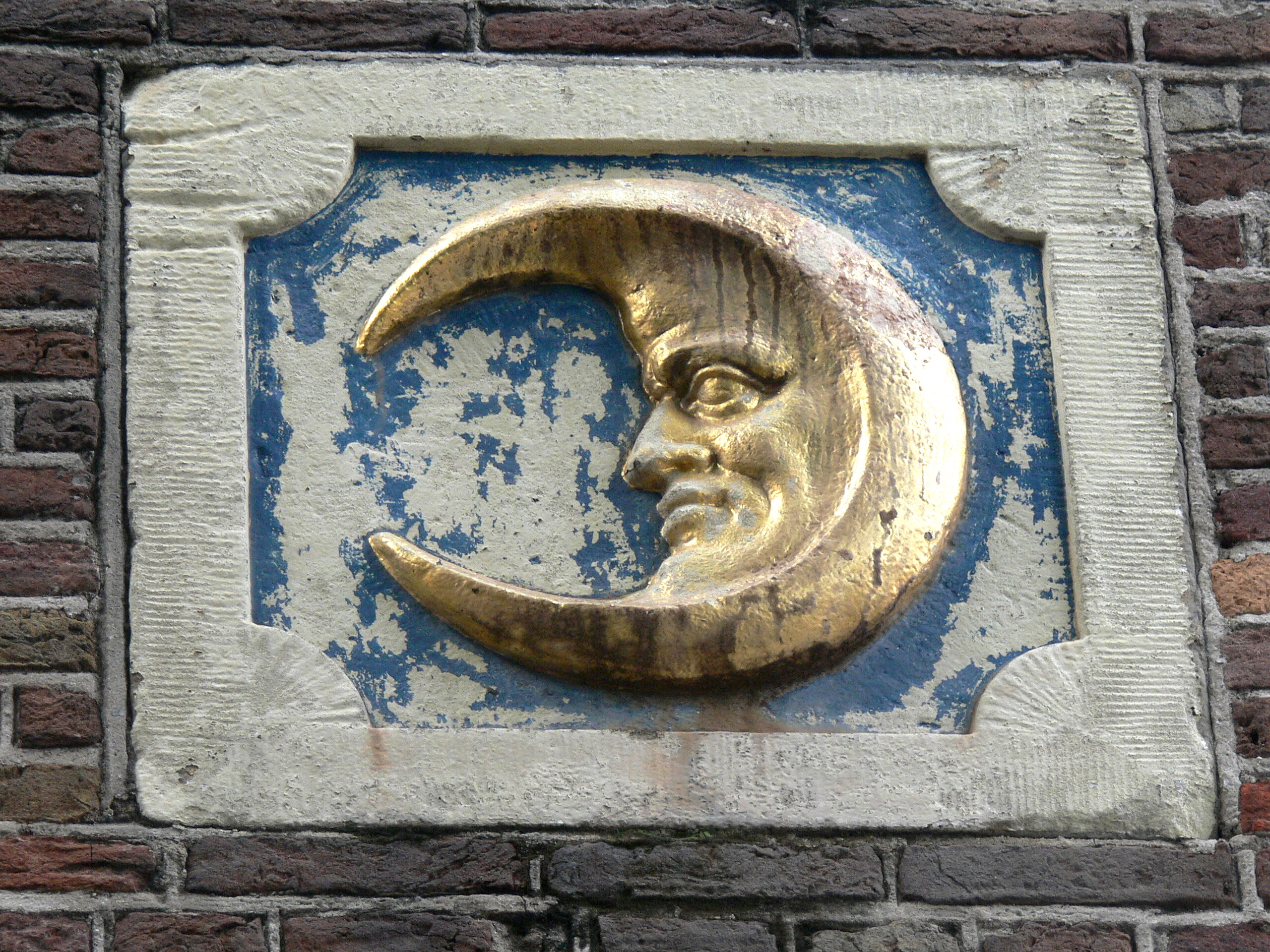 House sign "Halfmoon" in Amsterdam.